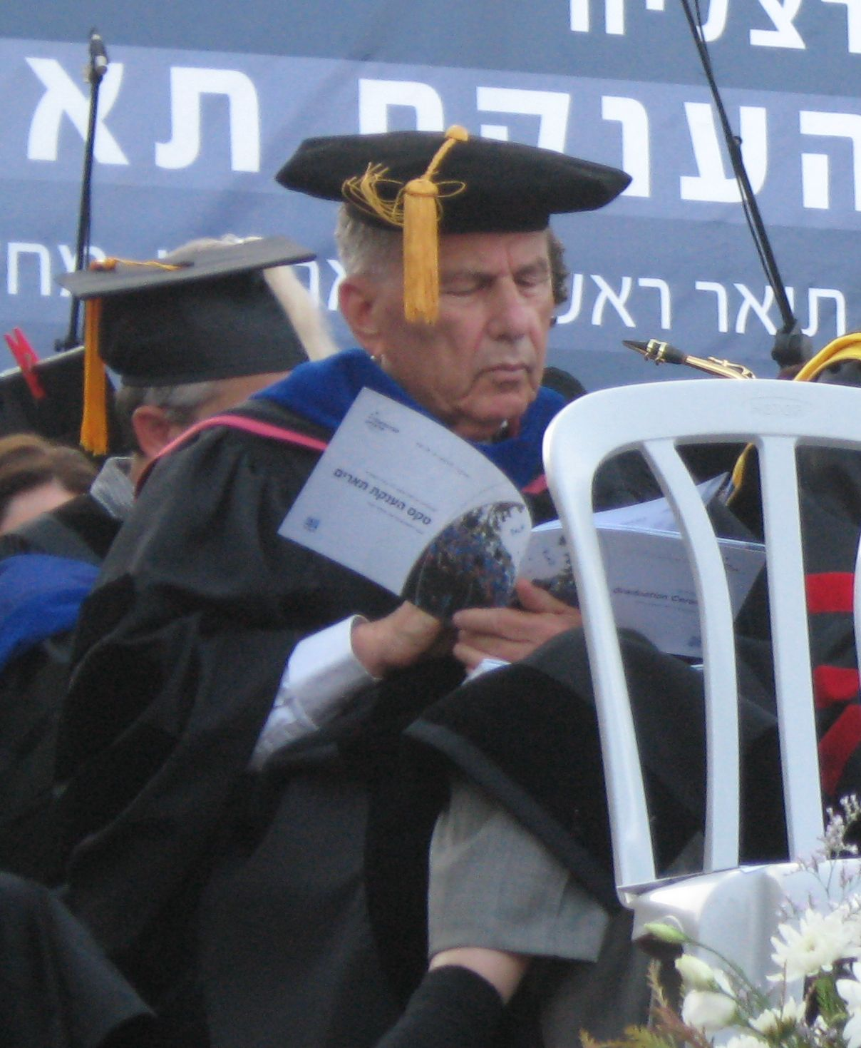 Amnon Rubinstein